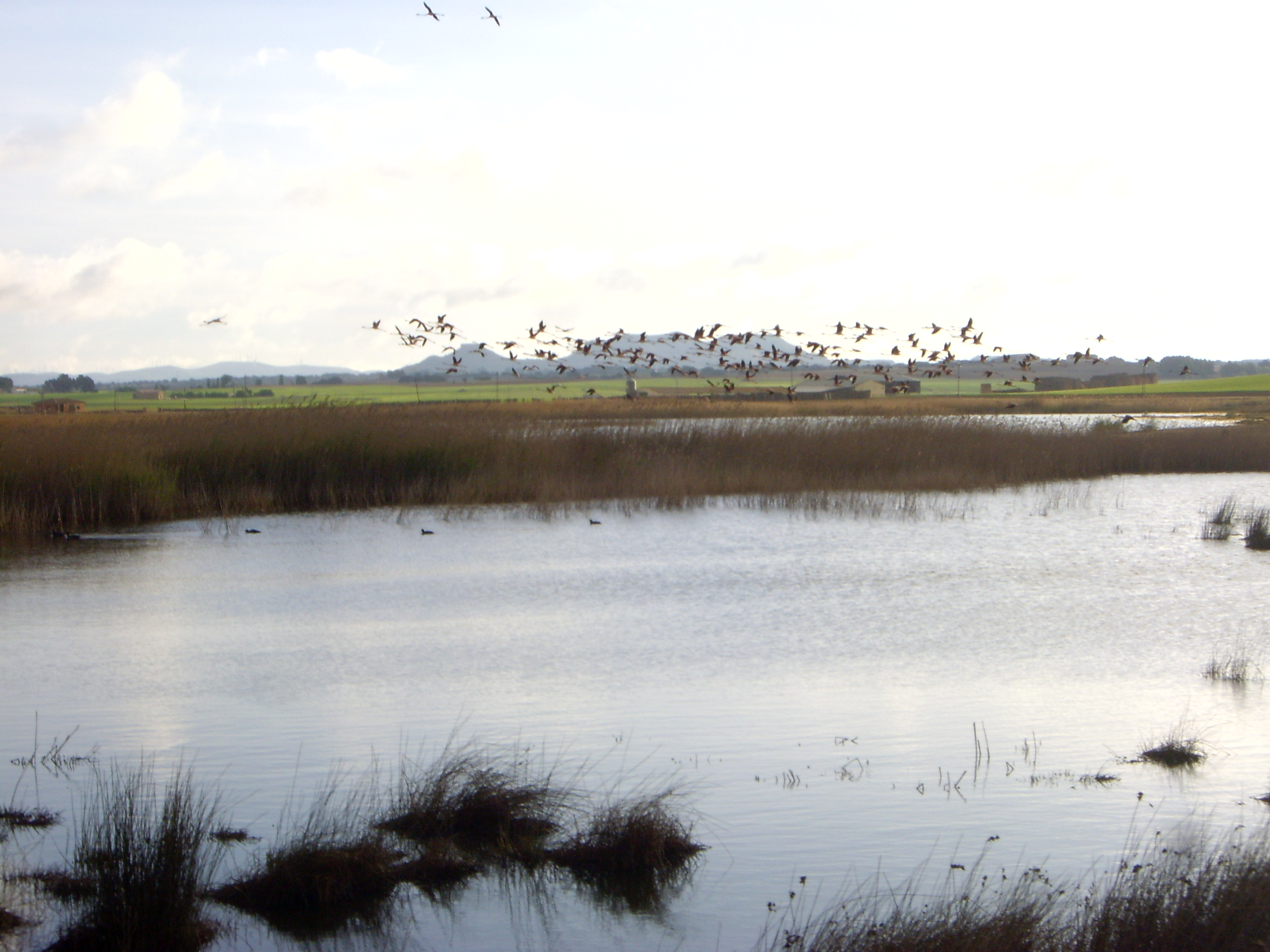 Laguna de Pétrola, Albacete